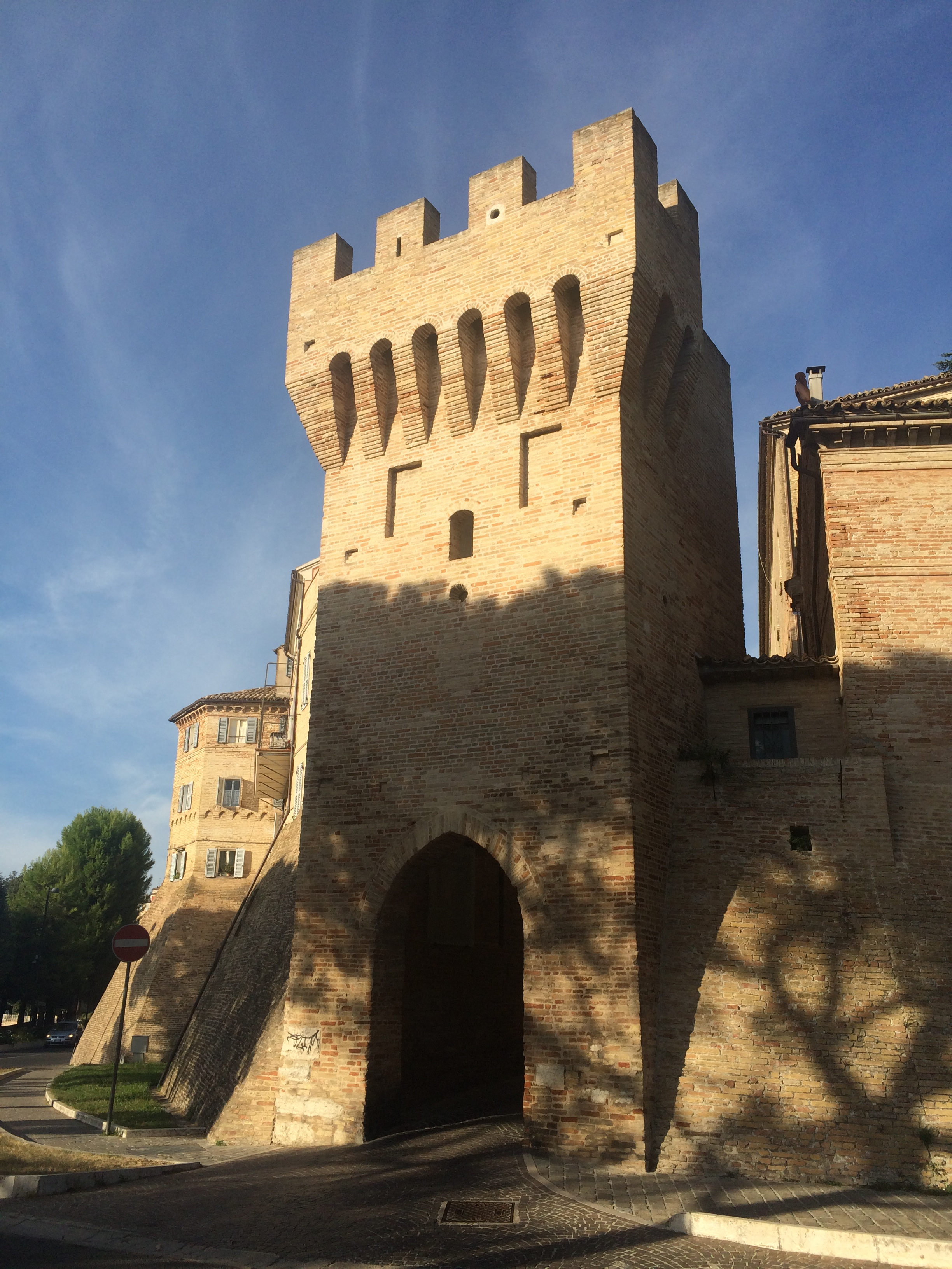 Porta Montana This is a photo of a monument which is part of cultural heritage of Italy.